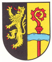 Wappen von Ohmbach